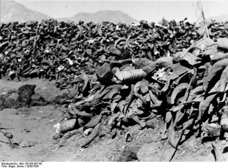 Lhasa, Wall aus Yak-, Schaf- und Ziegenhörnern am Rande von Lhasa Information added by Wikimedia users.